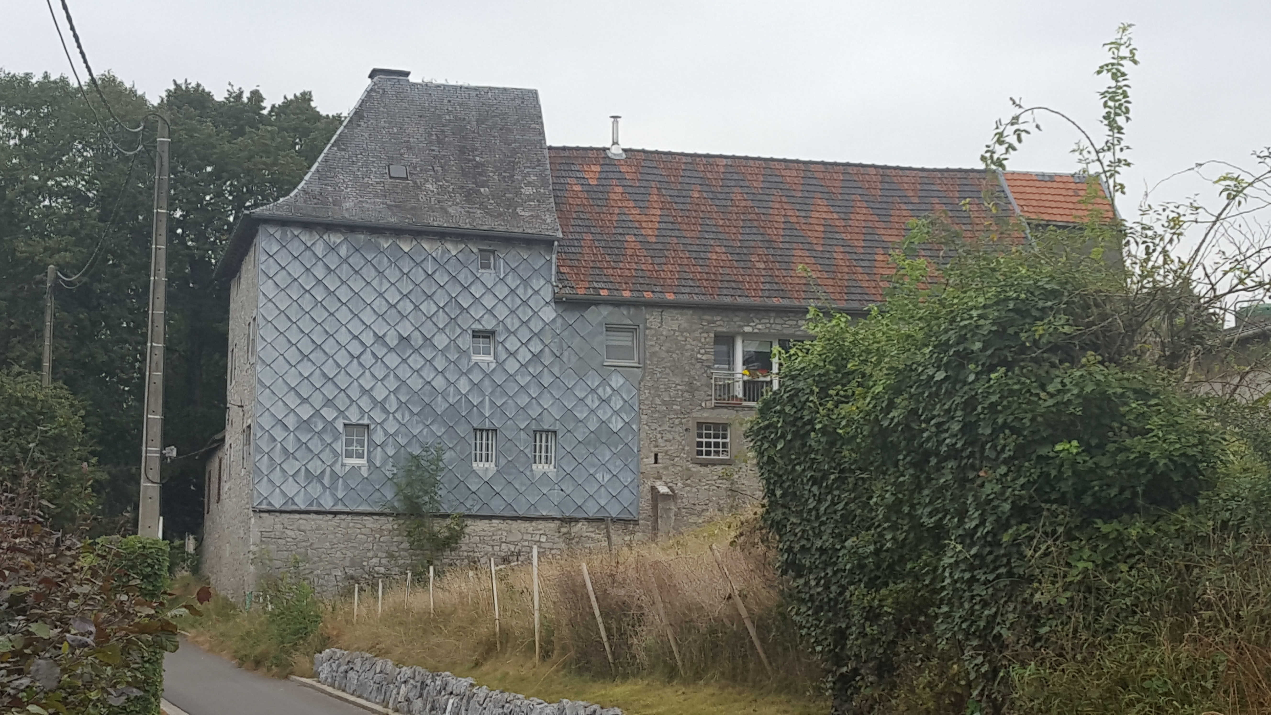 la tour Nereth, Baelen, Belgique